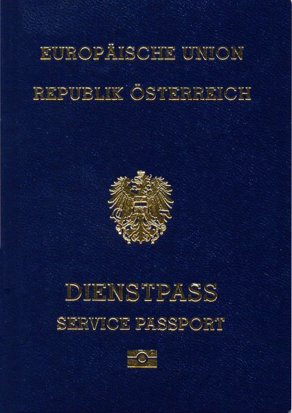 Dienstpass, wird an Personen gem. § 5 PassG ausgegeben.